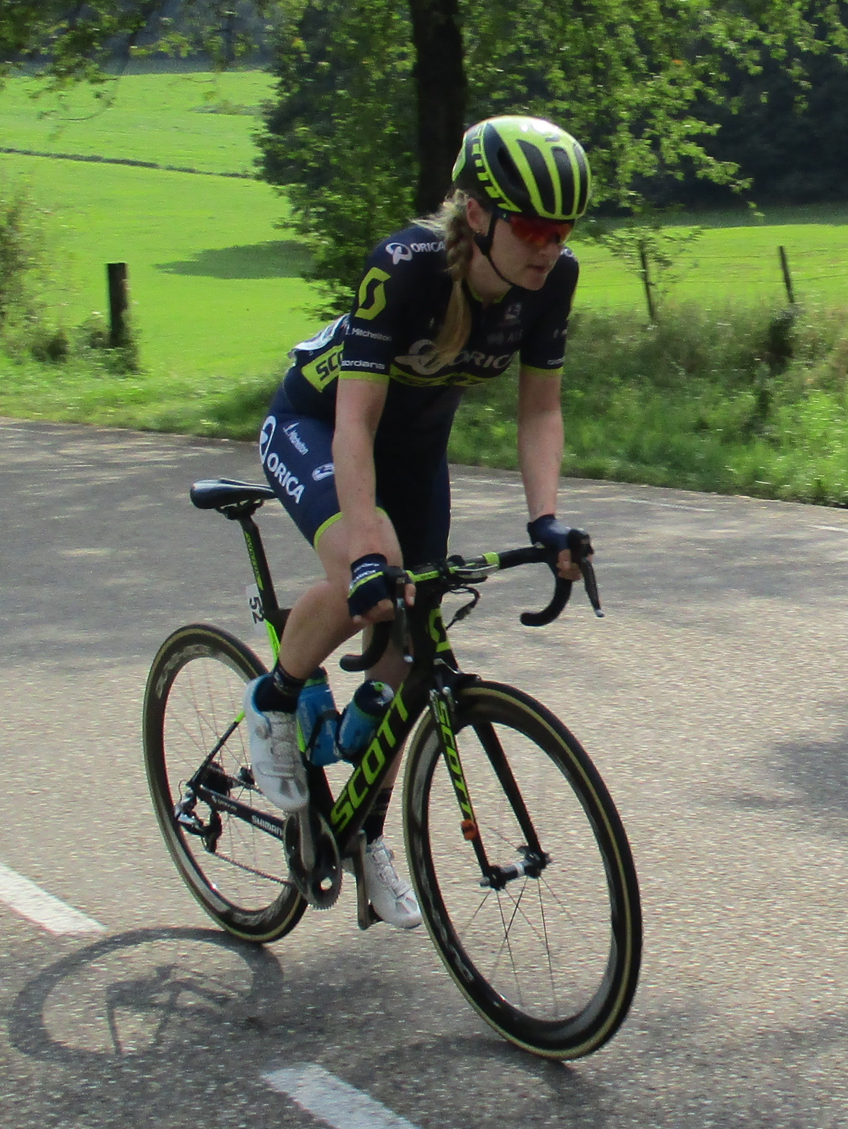 5e etappe van de Boels Ladies Tour 2017 door Zuid-Limburg, finish in Vaals.